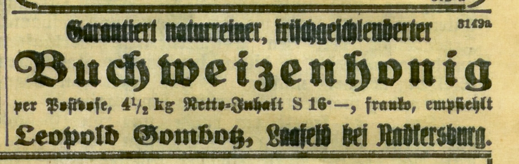 Werbung des österreichisch-ungarischen Imkers Leopold Gombocz (1875–1943), Laafeld bei Radkersburg (Steiermark), für Buchweizenhonig. Die Anzeige erschien im Jahr 1925 in der Grazer Tagespost.